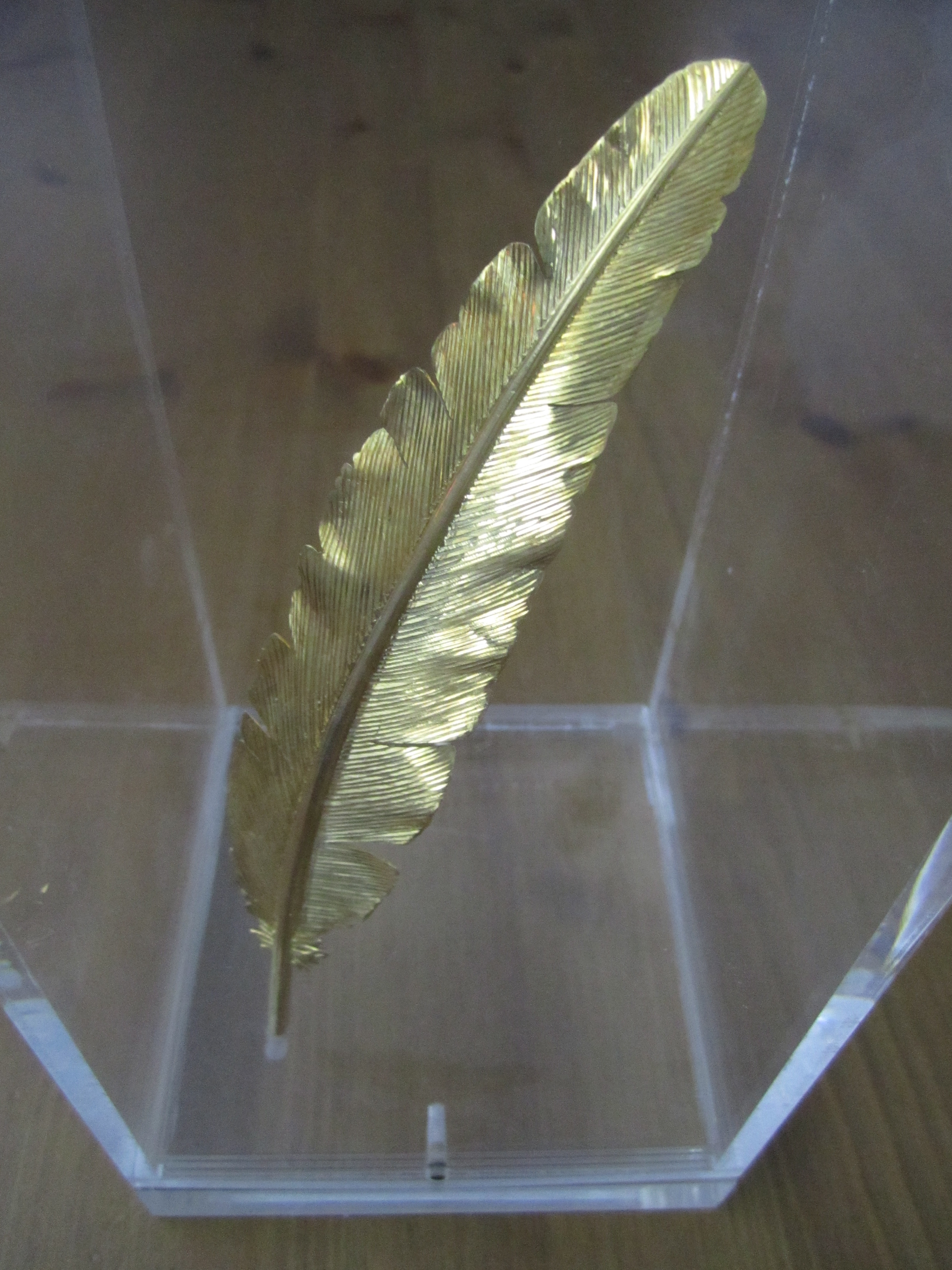 De Gouden Veer, de enige bedrijfsonderscheiding ter wereld in 18 karaat puur goud